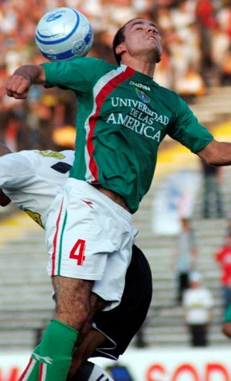 Humberto Suazo Pierde El Balon Ante Un Defensa Del Cuadro Italicocolocolo04